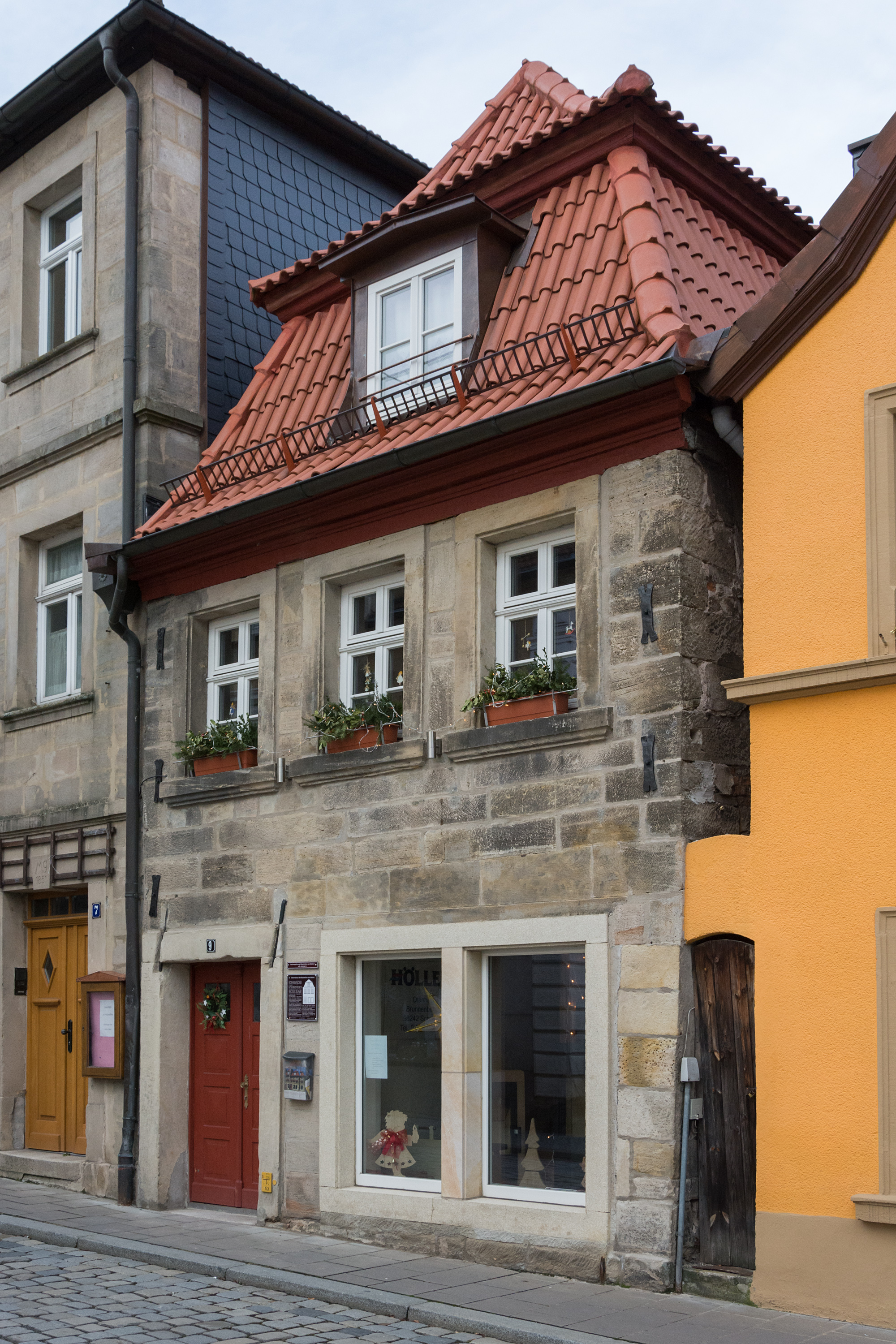 Gebäude Strauer Straße 9 in Kronach, Geburtshaus von Johann Maximilian von Welsch.